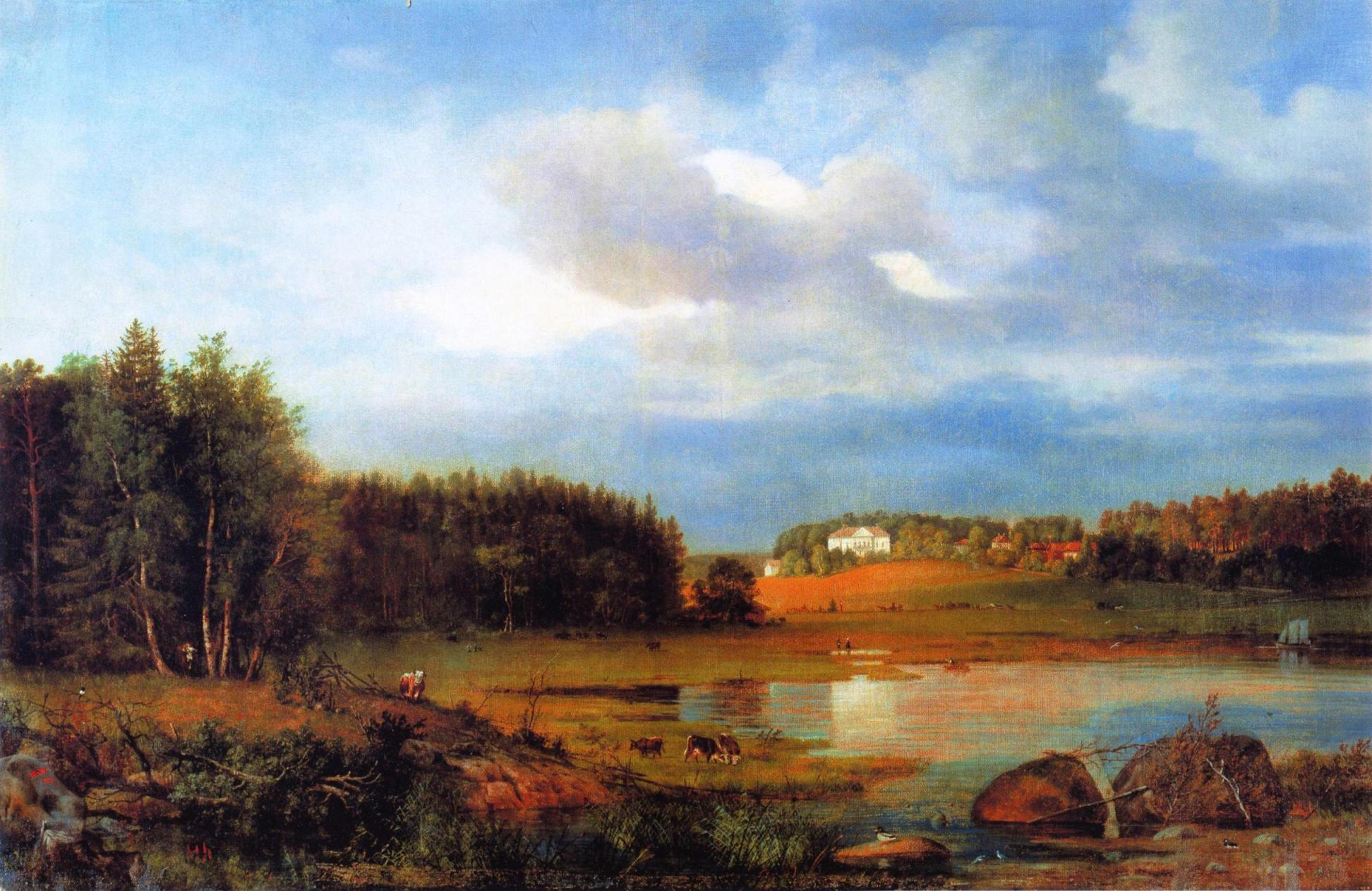 Helsingin Kumpulan kartano ympäristöineen kaakosta nähtynä, etualalla Vanhankaupunginlahden rantaniittyä. Maalauksen omistaa Helsingin kaupunginmuseo.